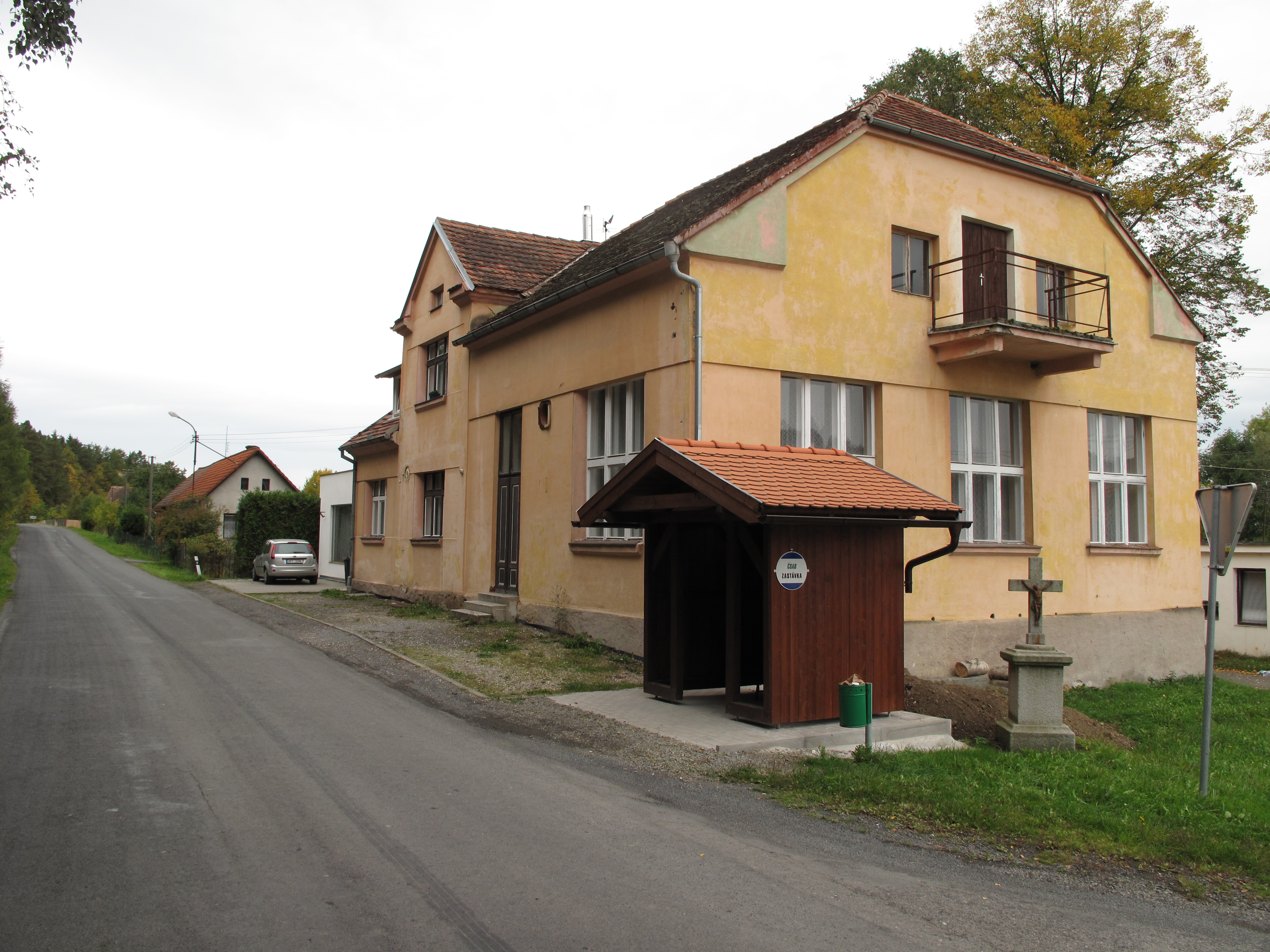 Stropčice. Okres Klatovy, Česká republika.